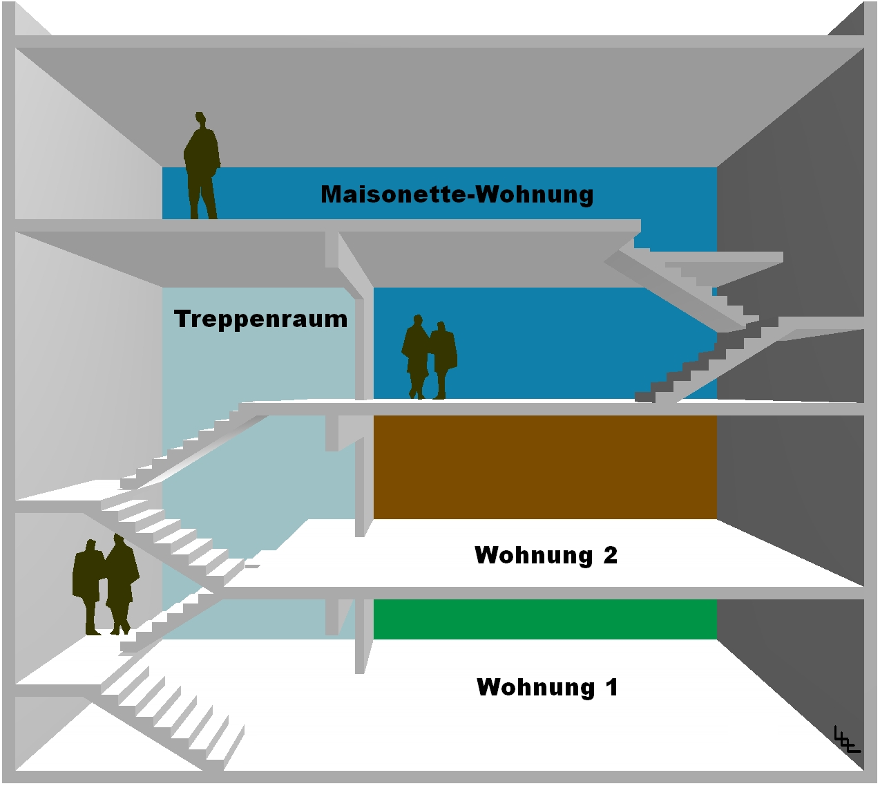 schematisches Beispiel für eine Maisonette-Wohnung